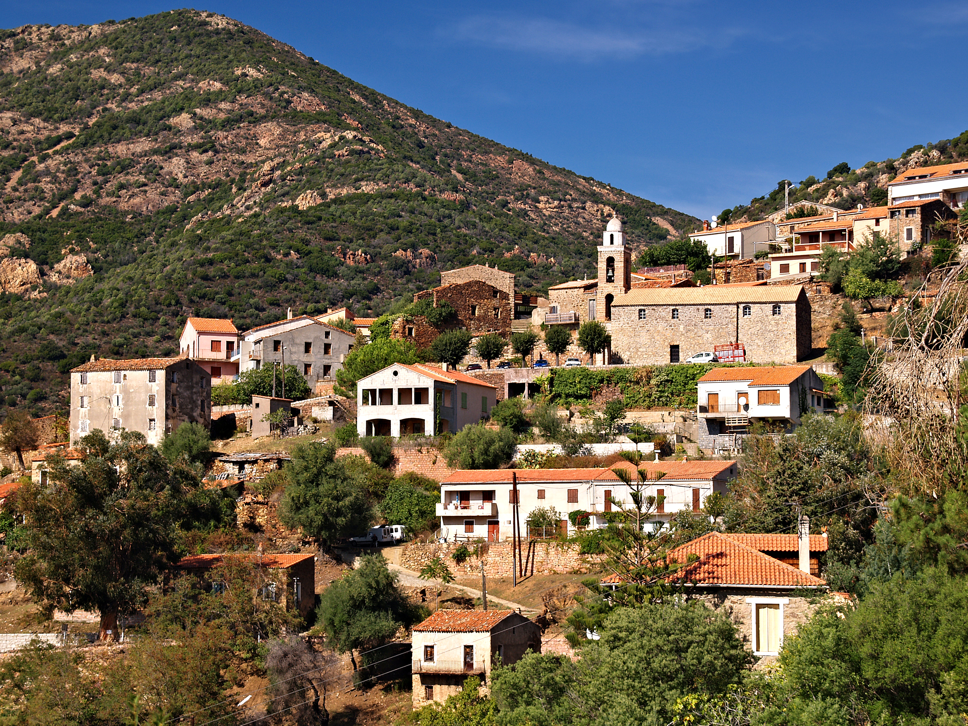 Partinello village